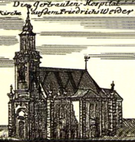 Berlin Gertraudenkirche, Ausschnitt